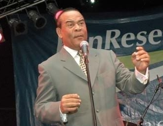 Humorista dominicano Luisito Martí (1945-2010)